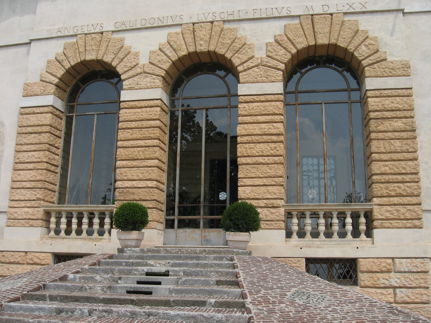 21 - 22 - 23 - 24 giugno author Senpai